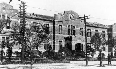 大连满铁中央试验所沙河研究所